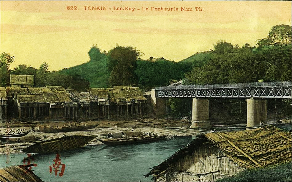 Cầu đường sắt Hồ Kiều, bắc qua sông Nậm Thi tại biên giới Lào Cai (Việt Nam) và Hà Khẩu (Vân Nam, Trung Quốc)